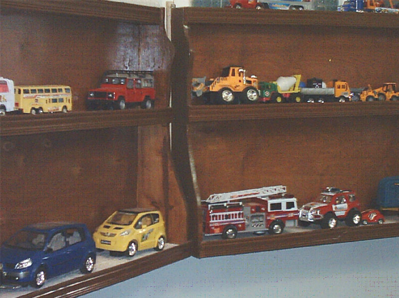 نماذج لبعض وسائل المواصلات (منتج الصورة Eng_momo86)